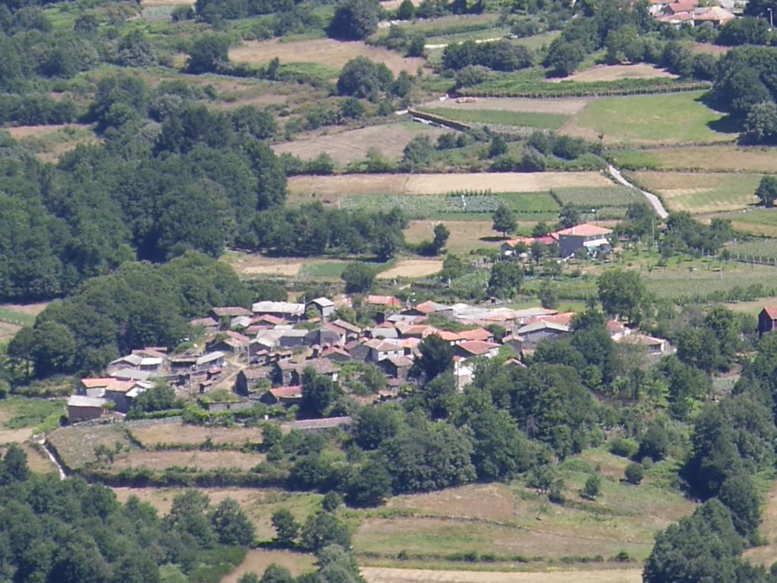 Buxan